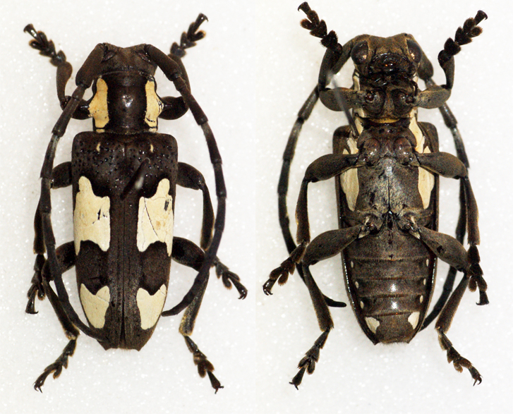 Gestro,1895 Sex: ? Data: 10-12-2006 - Singada - Tanzania Size: ?